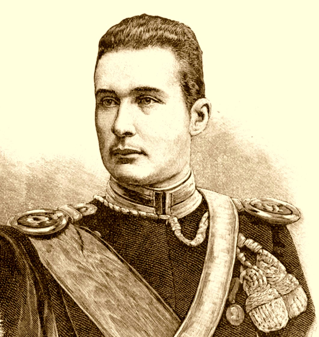 Erzherzogin Margaretha Sophie von Österreich und ihr Gemahl Herzog Albrecht von Württemberg.